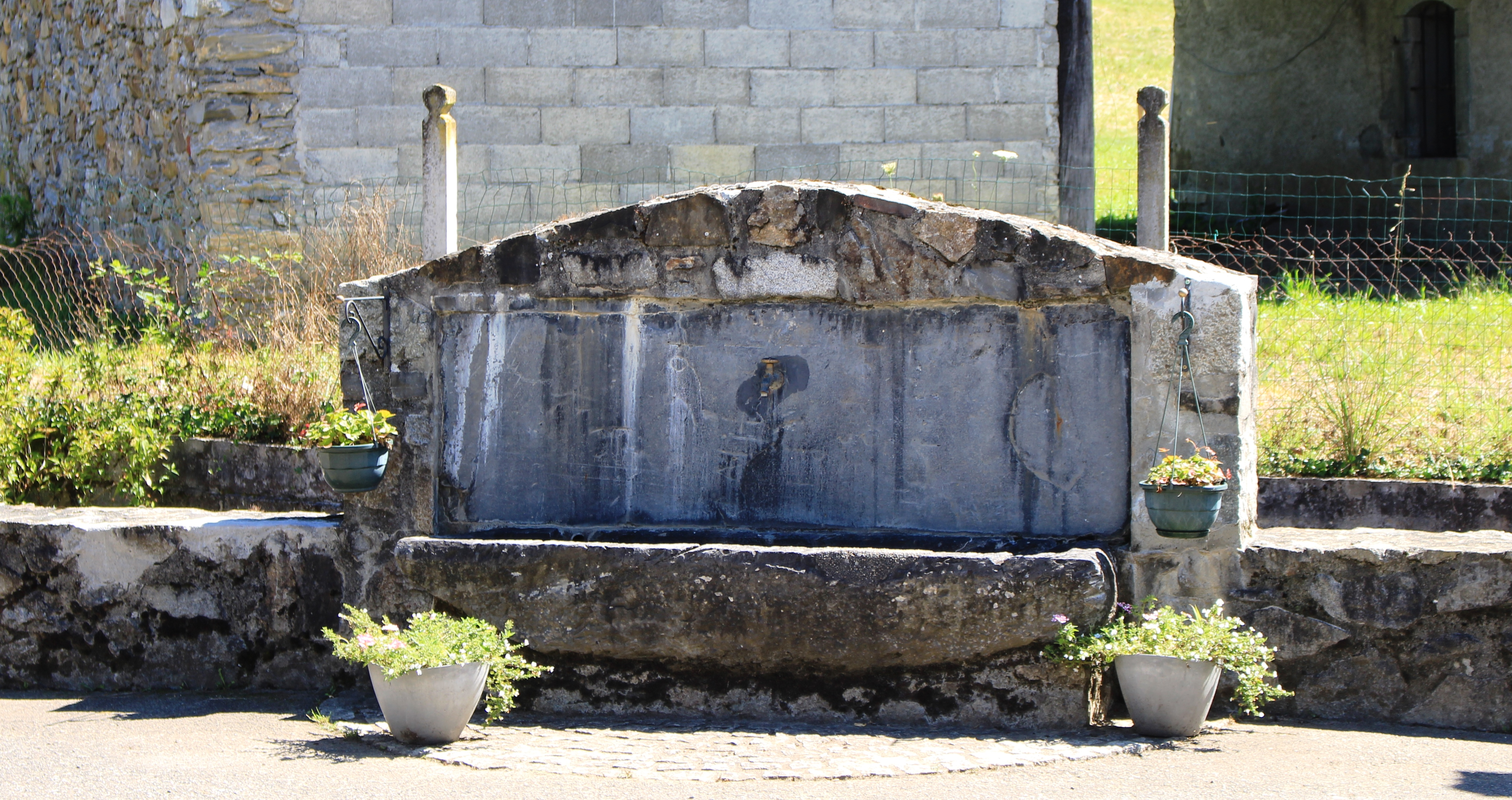 Fontaine de Labastide (Hautes-Pyrénées)